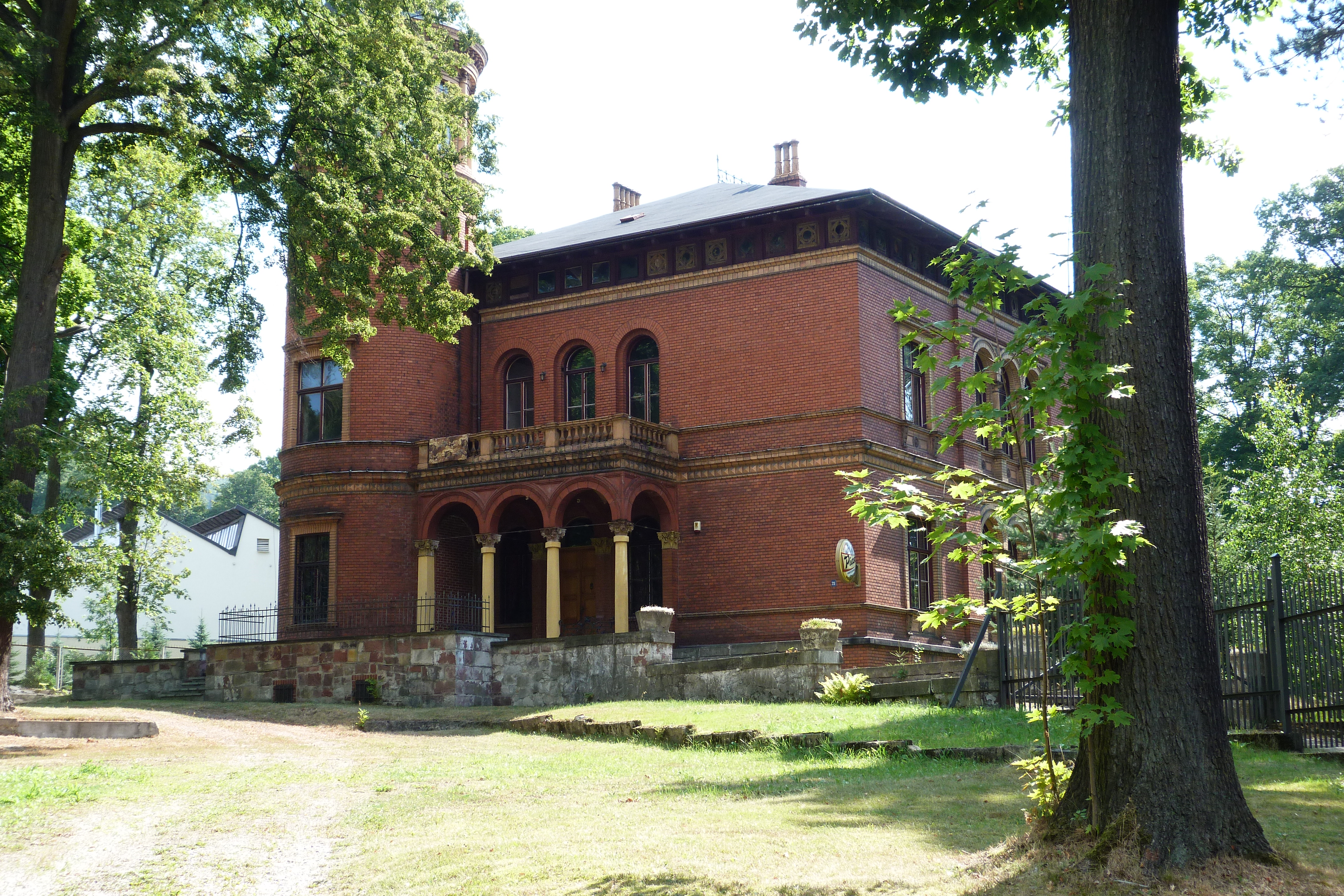 Głuszyca, ul. Grunwaldzka 21 - willa, 1894